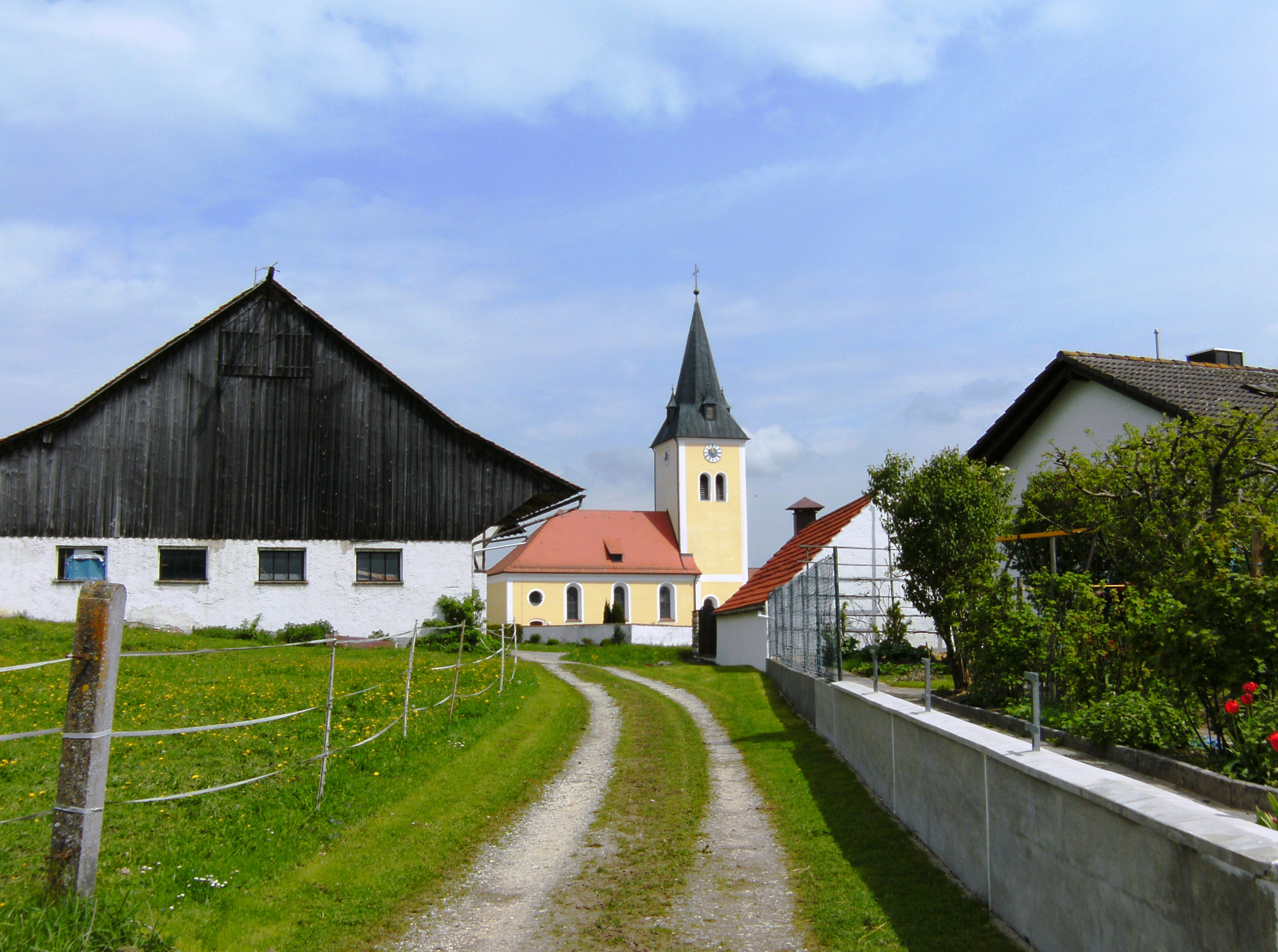 Katholische Kirche von Arnbuch im Landkreis Eichstätt, Regierungsbezirk Oberbayern